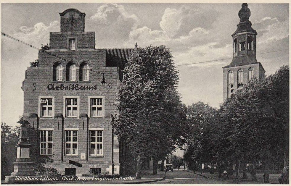 Altes Rathaus in Nordhorn, Lingener Straße 3; erbaut 1914